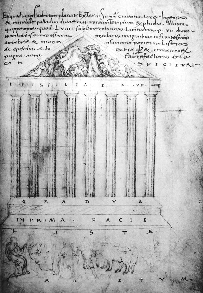 Il Partenone disegnato da Ciriaco Pizzecolli